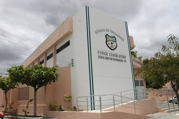 Câmara de vereadores de Santa Cruz do Capibaribe